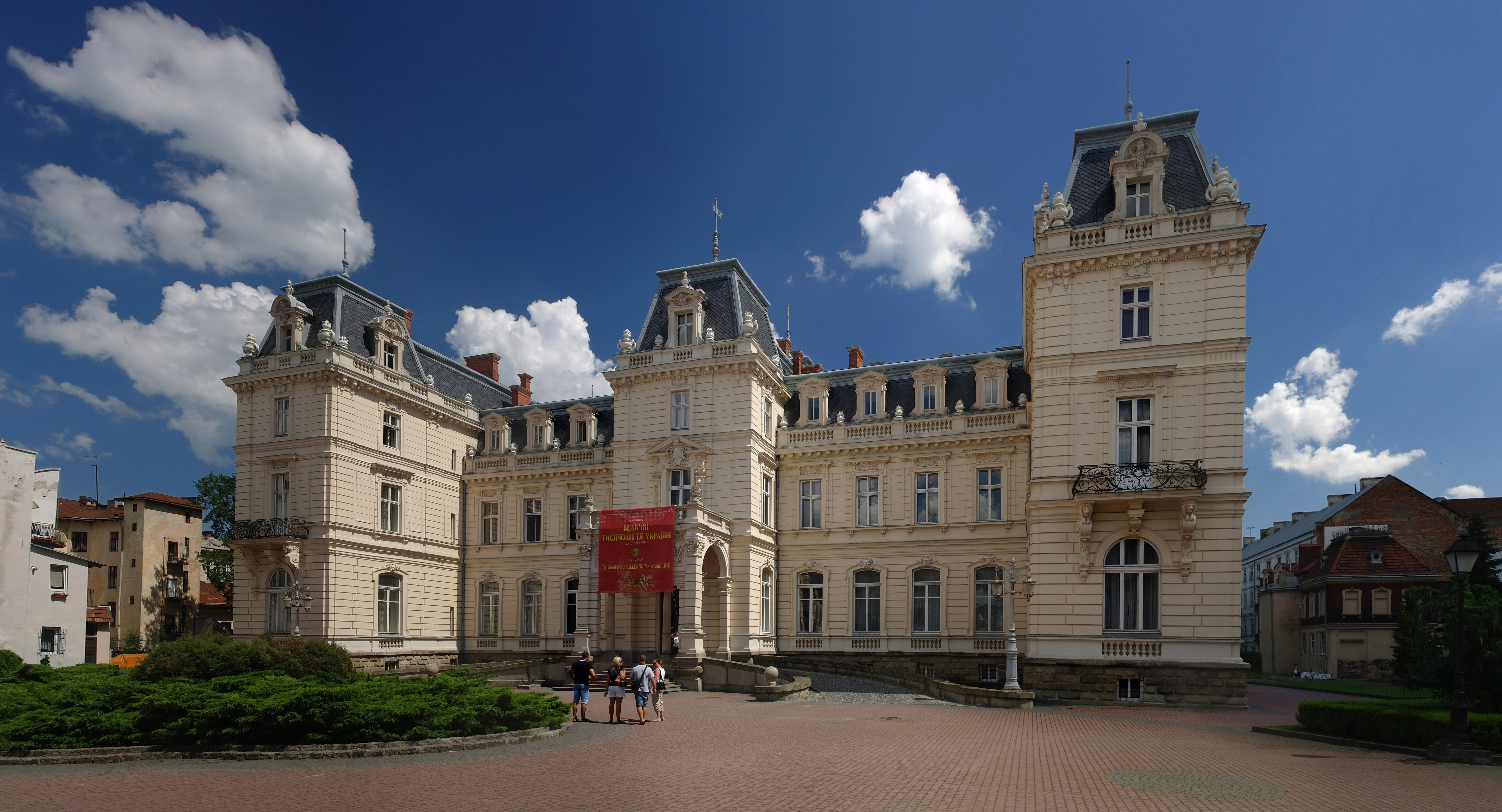 Львів, палац Потоцького